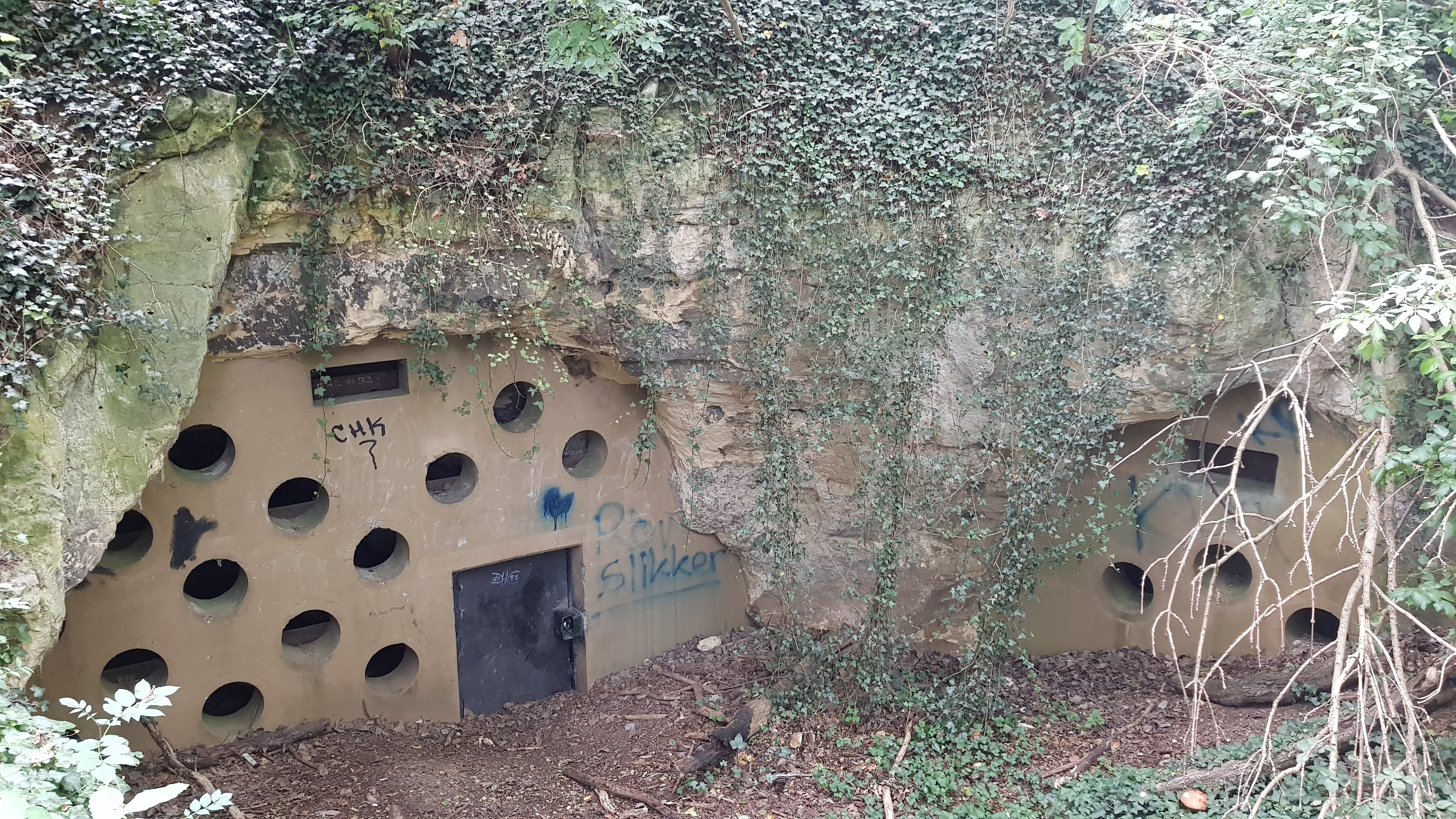 Keerderberggroeve-zuid, Cadier en Keer, Nederland